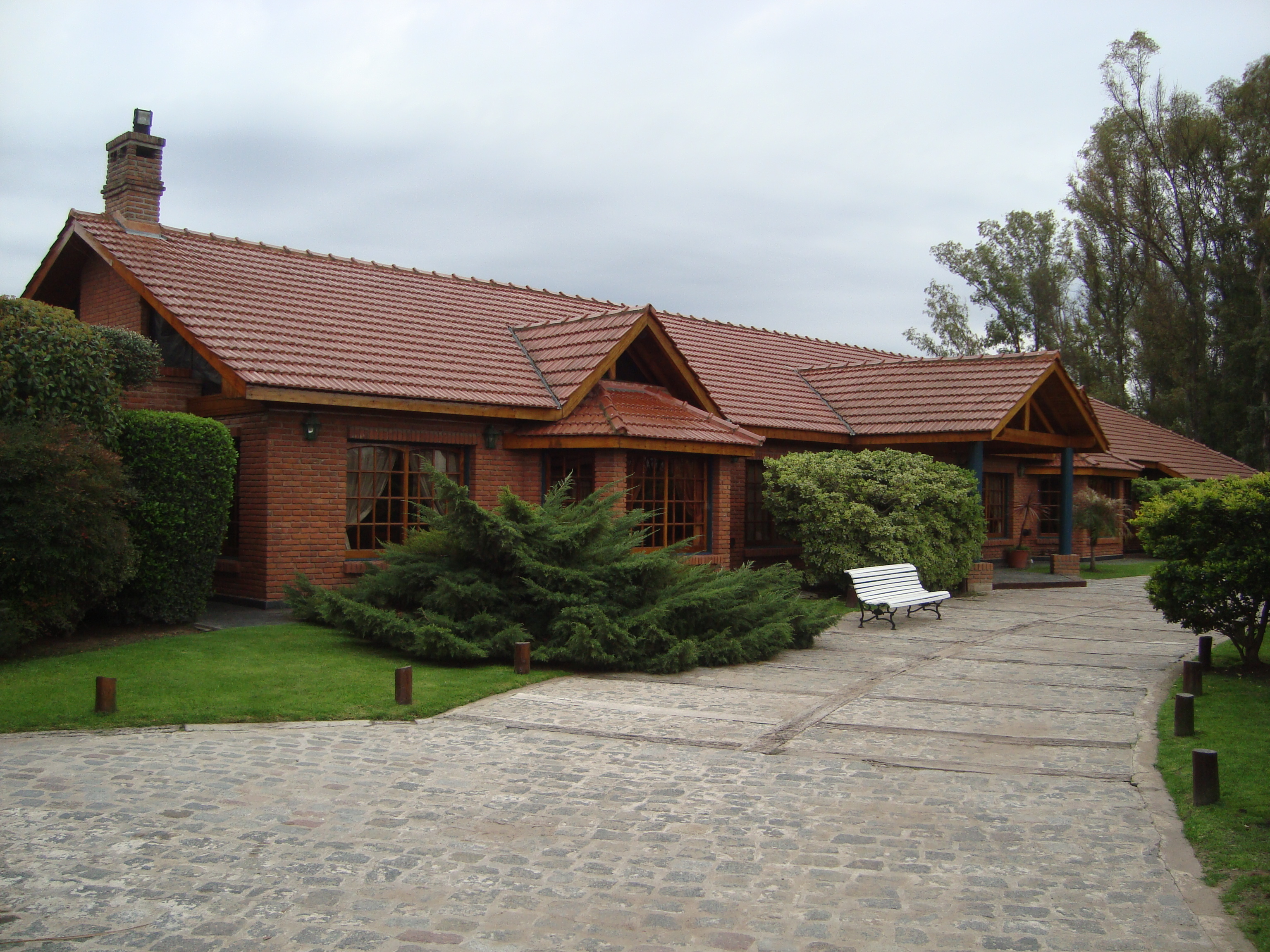 Predio de entrenamiento del Club Atlético Vélez Sarsfield. Ituizaingó, Buenos Aires.